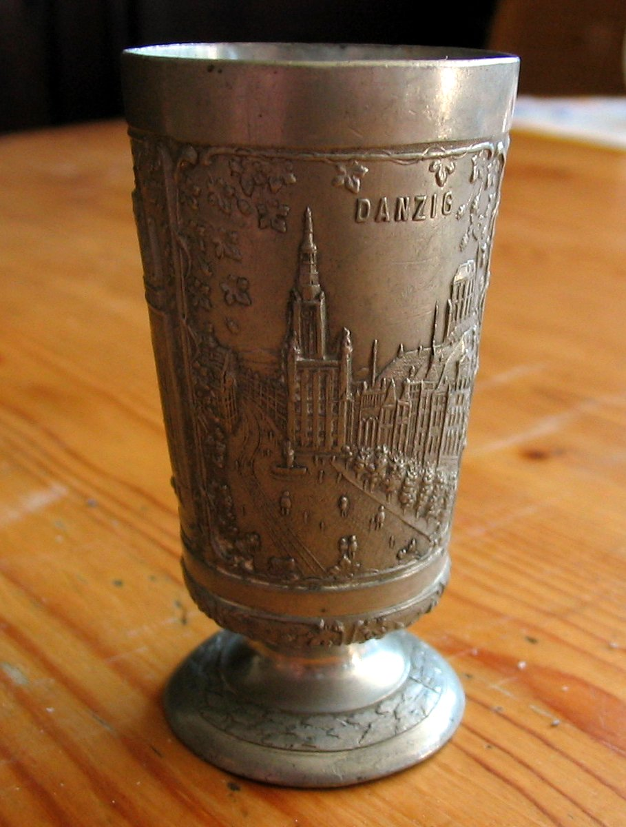 Gdański kieliszek wykonany z cyny Srpskohrvatski / српскохрватски: kalajna čaša iz Gdanjska